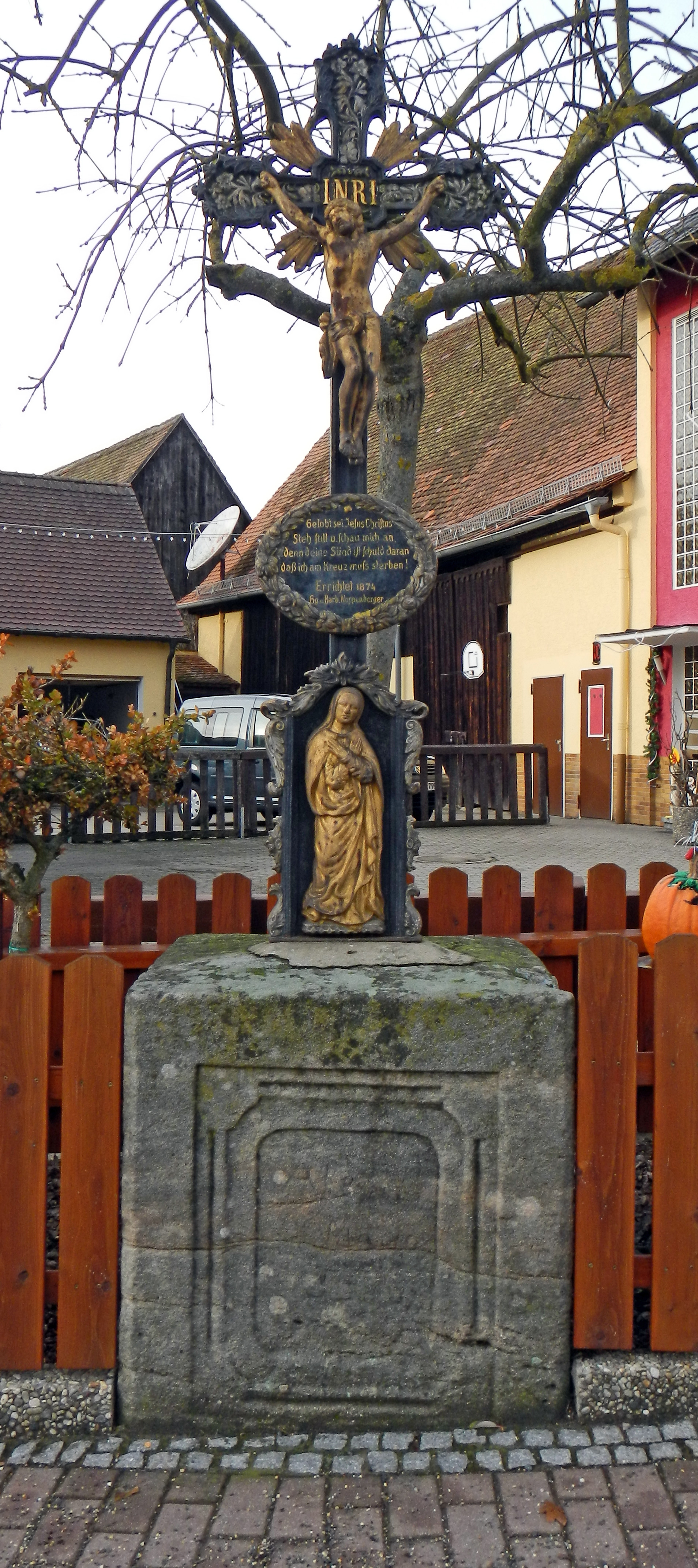 Kruzifix, Sandstein, bez. 1874 in Klebheim (Gemeinde Heßdorf) im Landkreis Erlangen-Höchstadt.